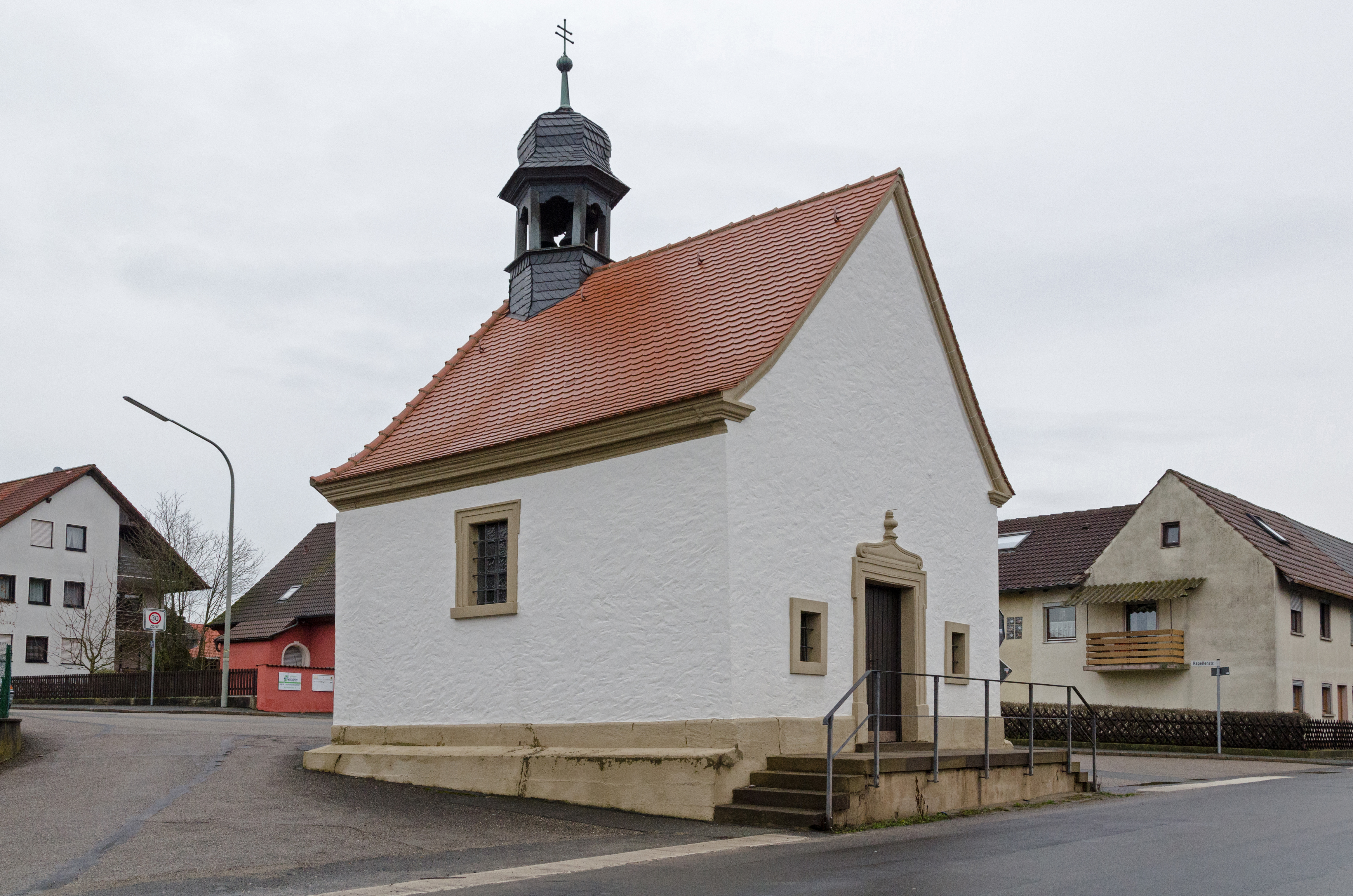 Geiselwind, Kapelle St. Marien